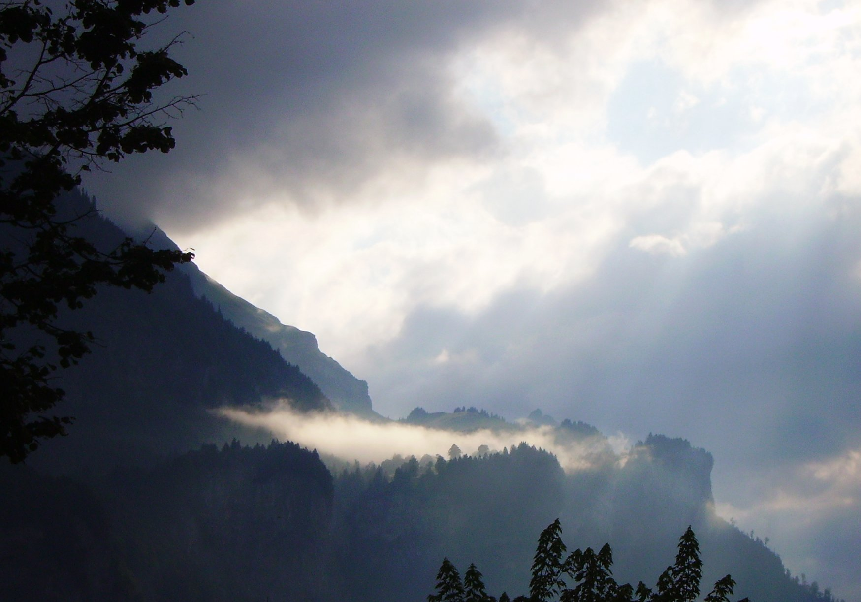 (en) Stratus cloud, lightened by the sun shining through the little cloud hole. Surrounding is still dark. (de) Stratuswolke, durch die Sonne beleuchtet. Die Umgebung ist dunkel. Bearbeitung: Zugeschnitten, Kontrast erhöht (GIMP)